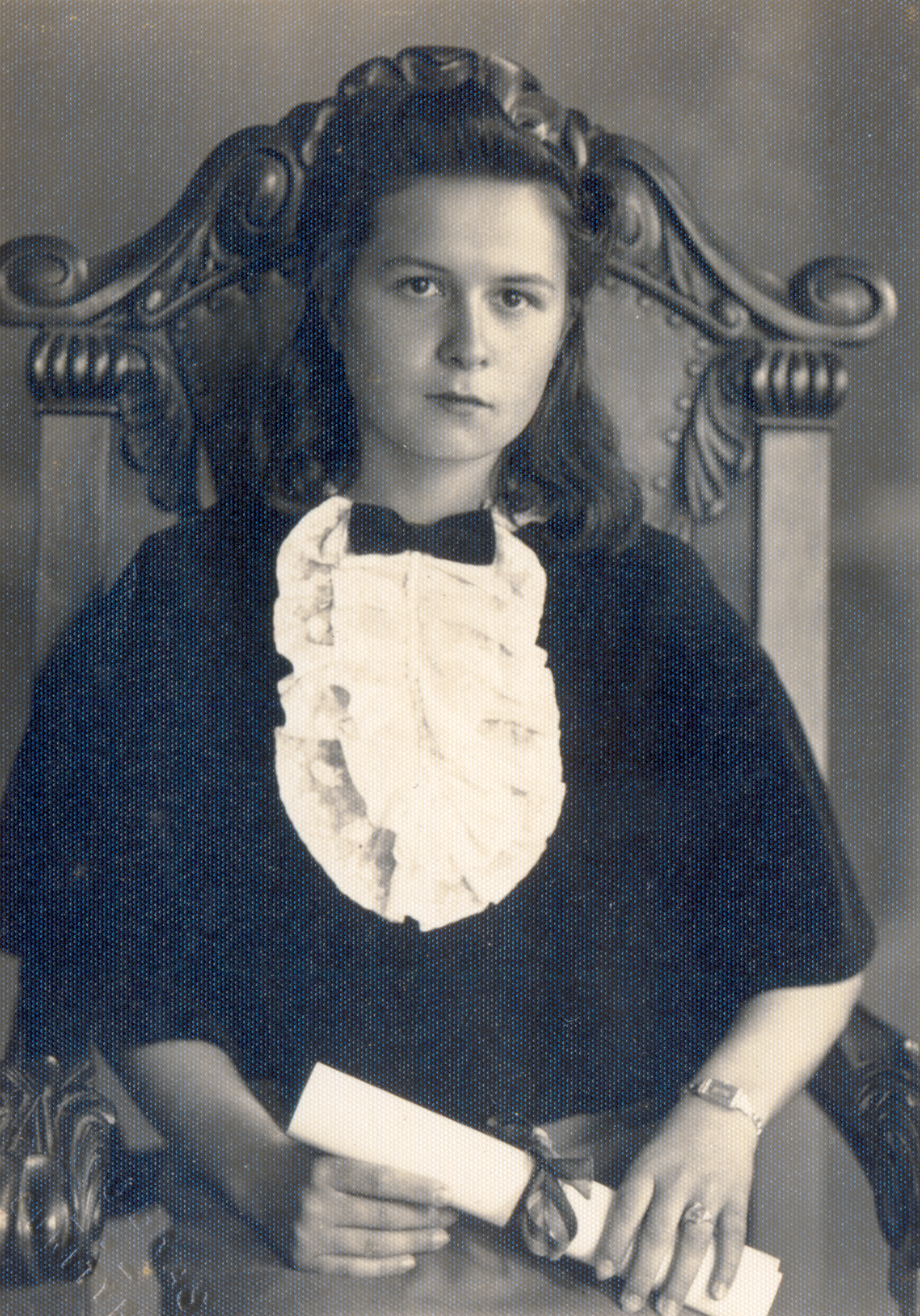 Fotografía de Lotte Schulz del día de su colación en 1942, digitalizada por mí de su álbum personal.